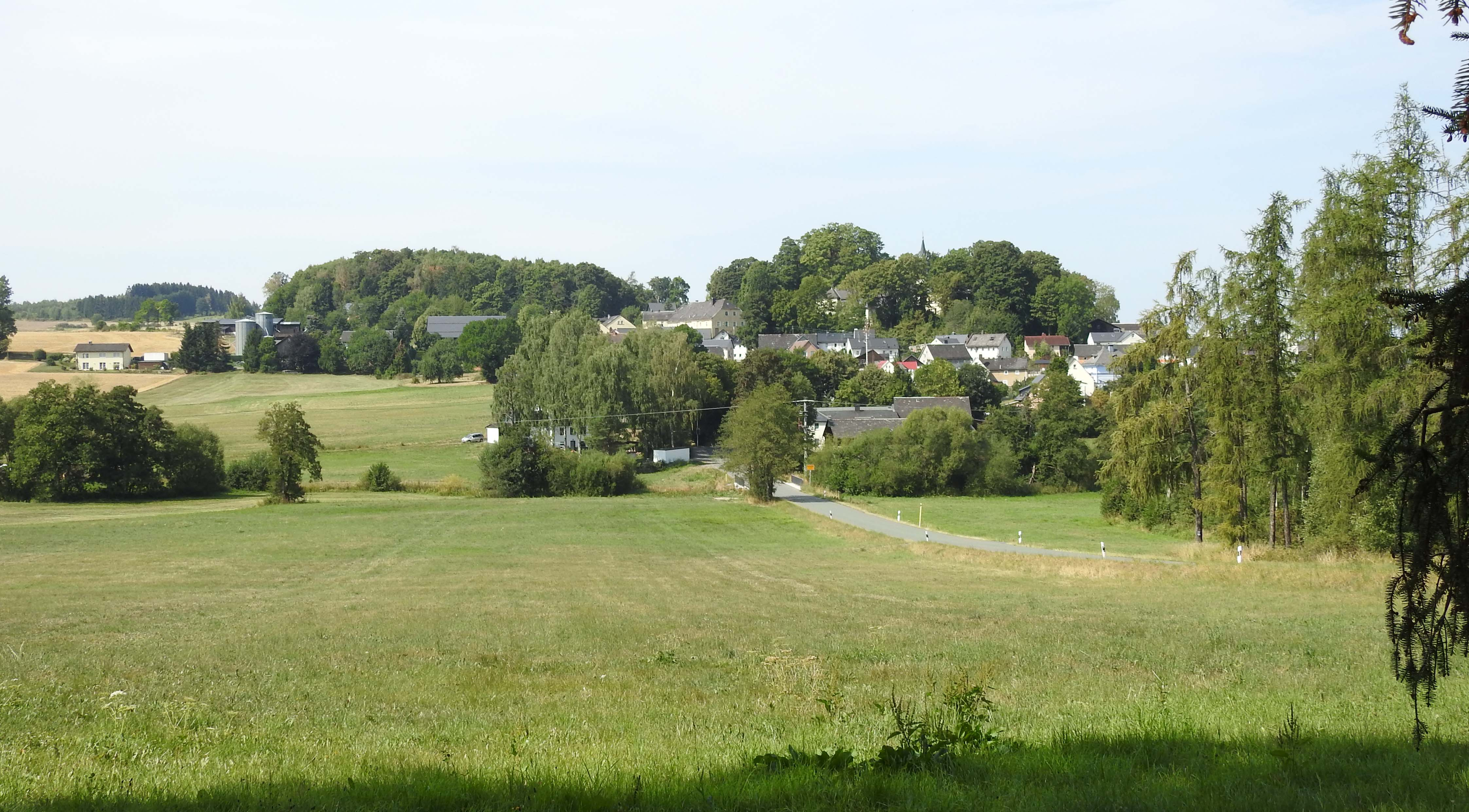 Reitzenstein von Osten, Issigau